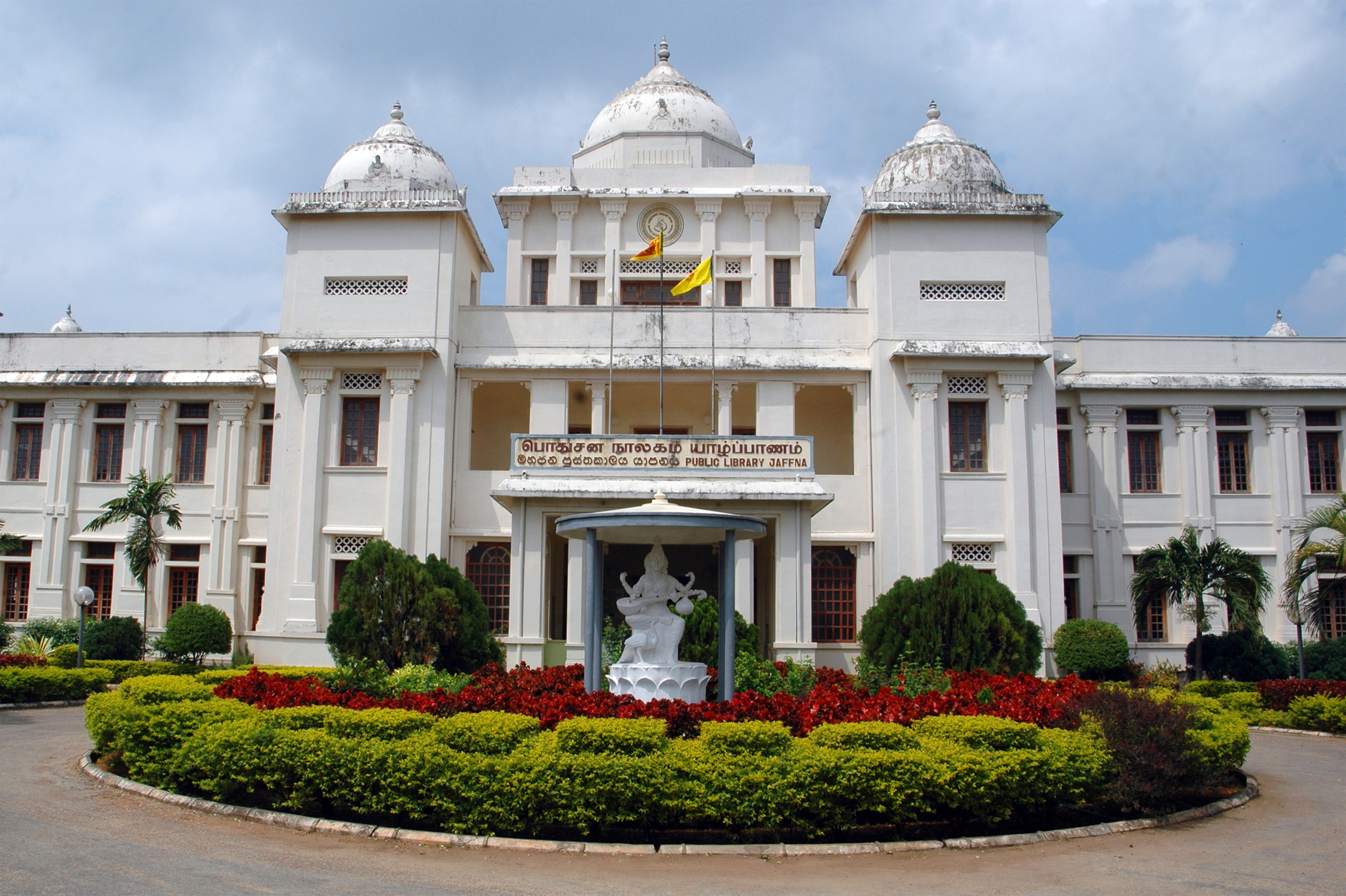 யாழ்ப்பாணம் பொது நூலகம்